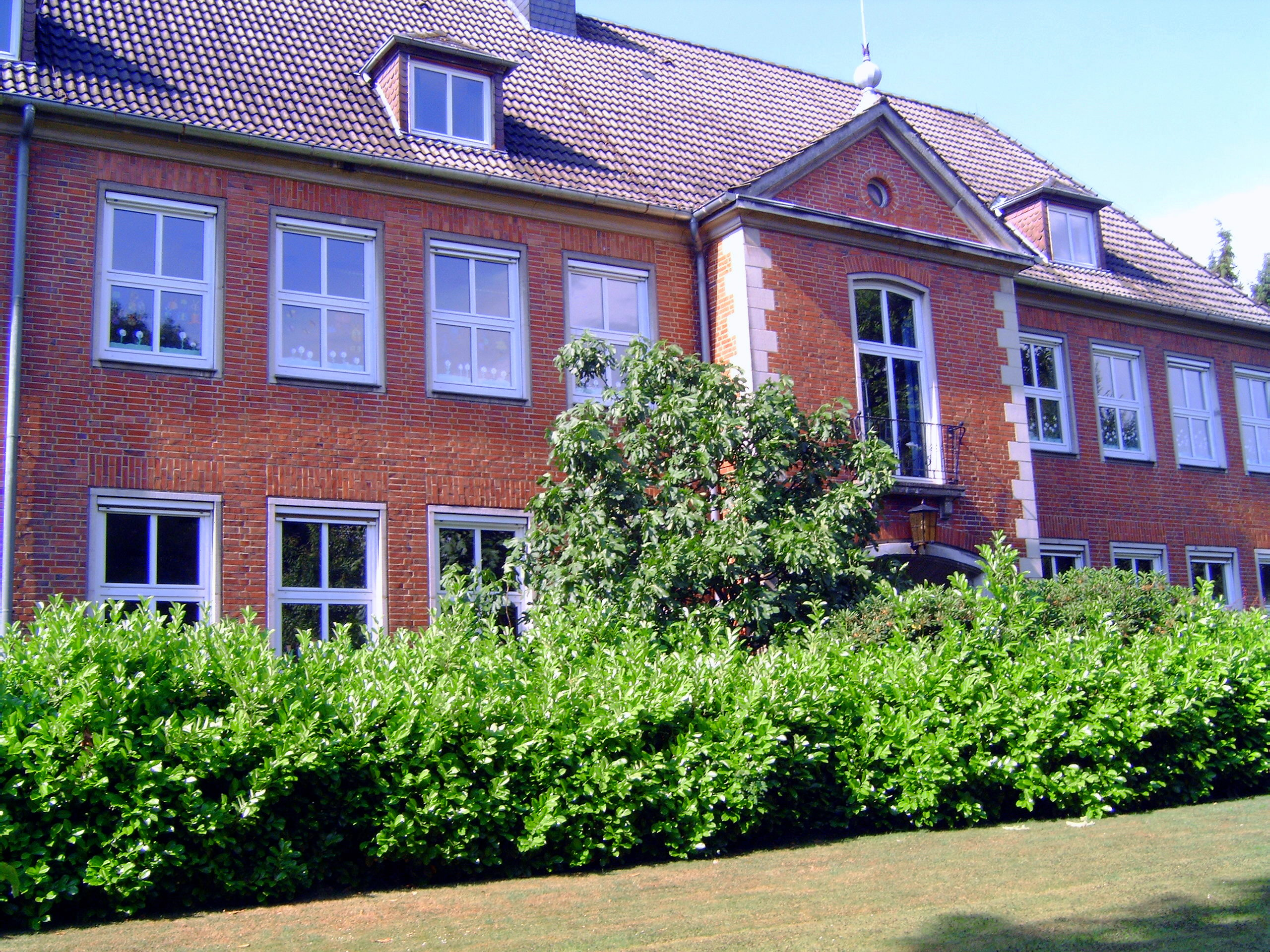 Die Gerbertschule in Visbek